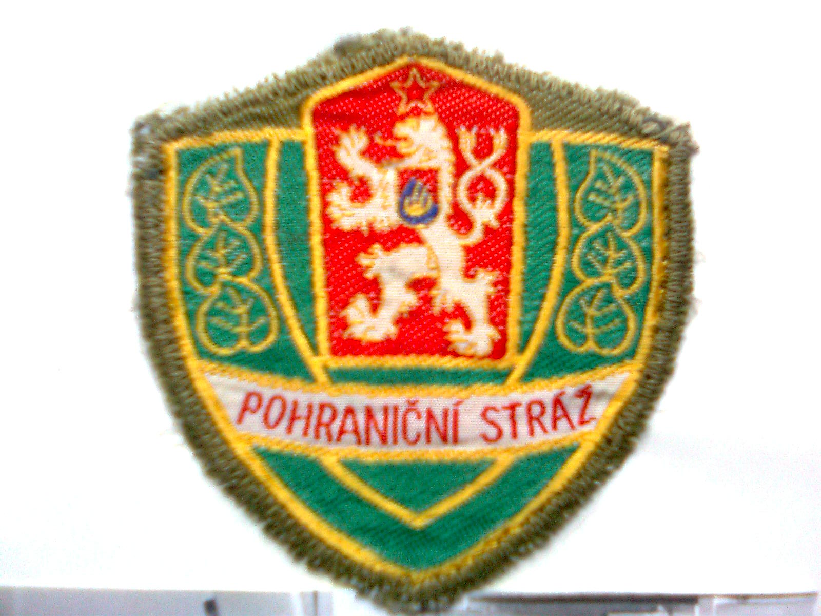 Pohraniční stráž. Československá socialistická republika . Autor fotografie Jiří Zelenka. Uniforms, badges and information (PS).